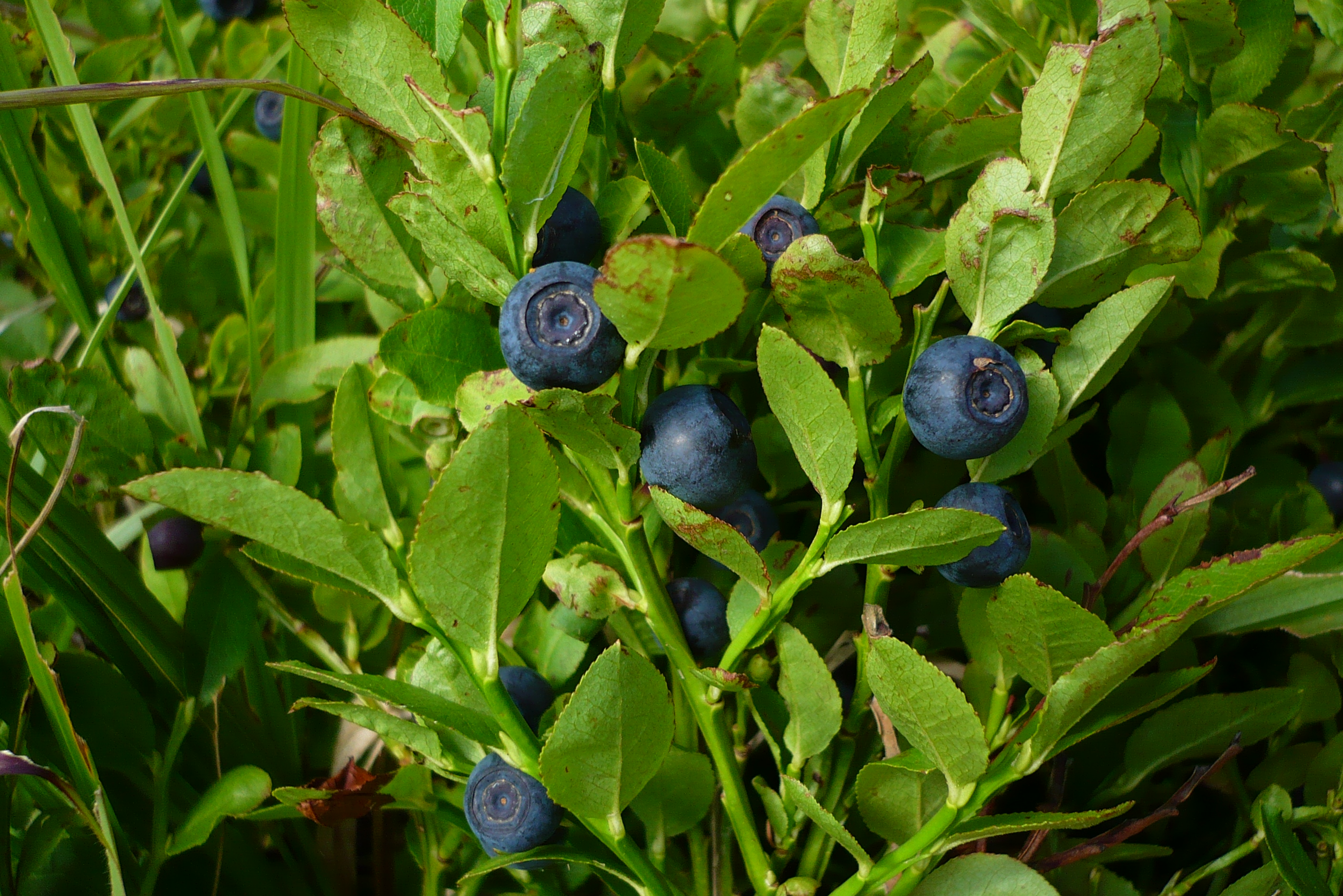 Čučoriedky